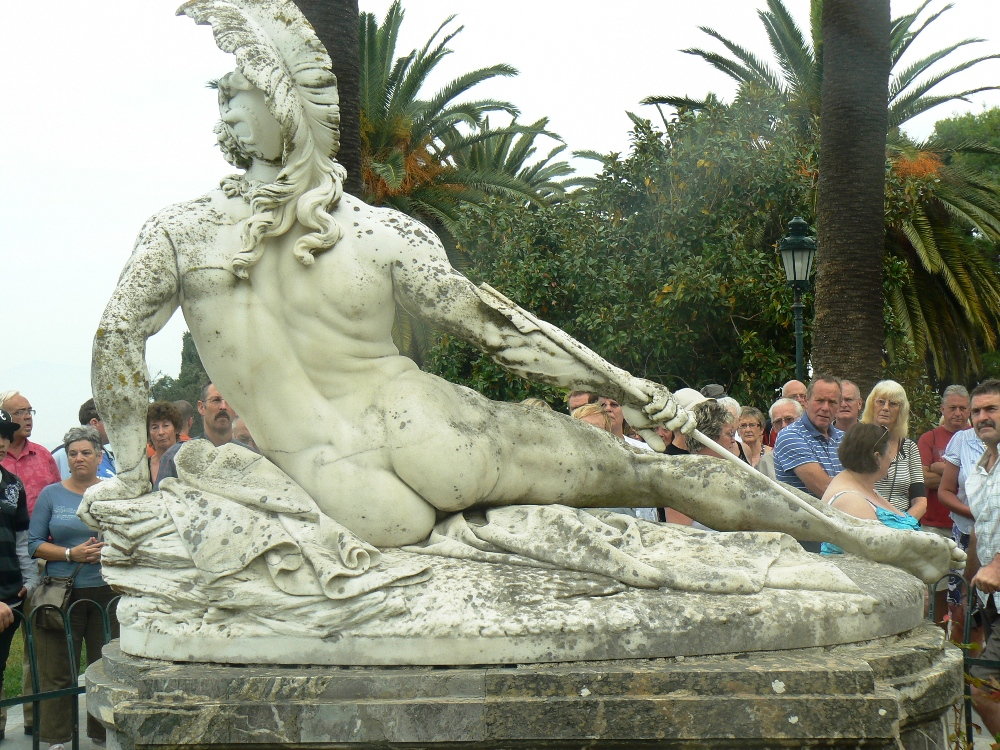 פסל אכילס הגוסס לאחר שנפגע בחץ בעקבו באכיליון, קורפו רישיון נוצר על ידי משתמש:י.ש.